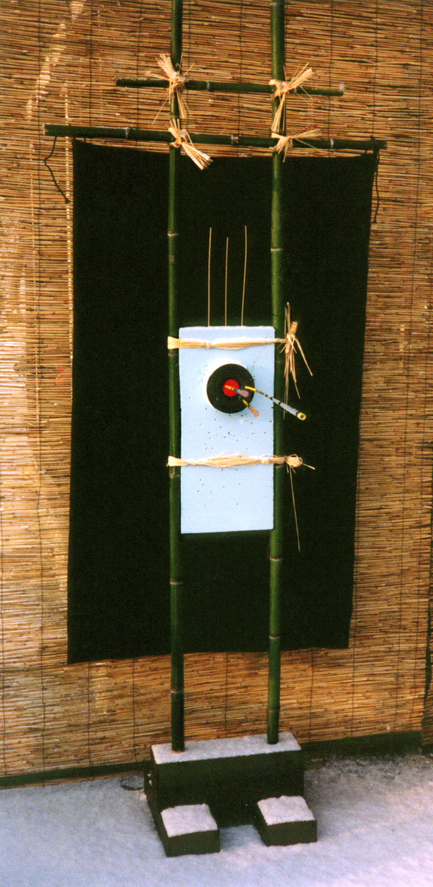 Les cibles de l'école du souffle Sarbacana, sont conçu afin que la pratique puisse, aussi, s’effectuer dans la pénombre. Ces cibles-tambours offrent une gamme de sons différents en fonction du lieu d'impact dans la cible.